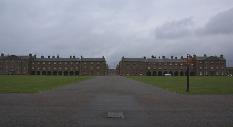 Fort George, Ardersier (Scotland) - parade